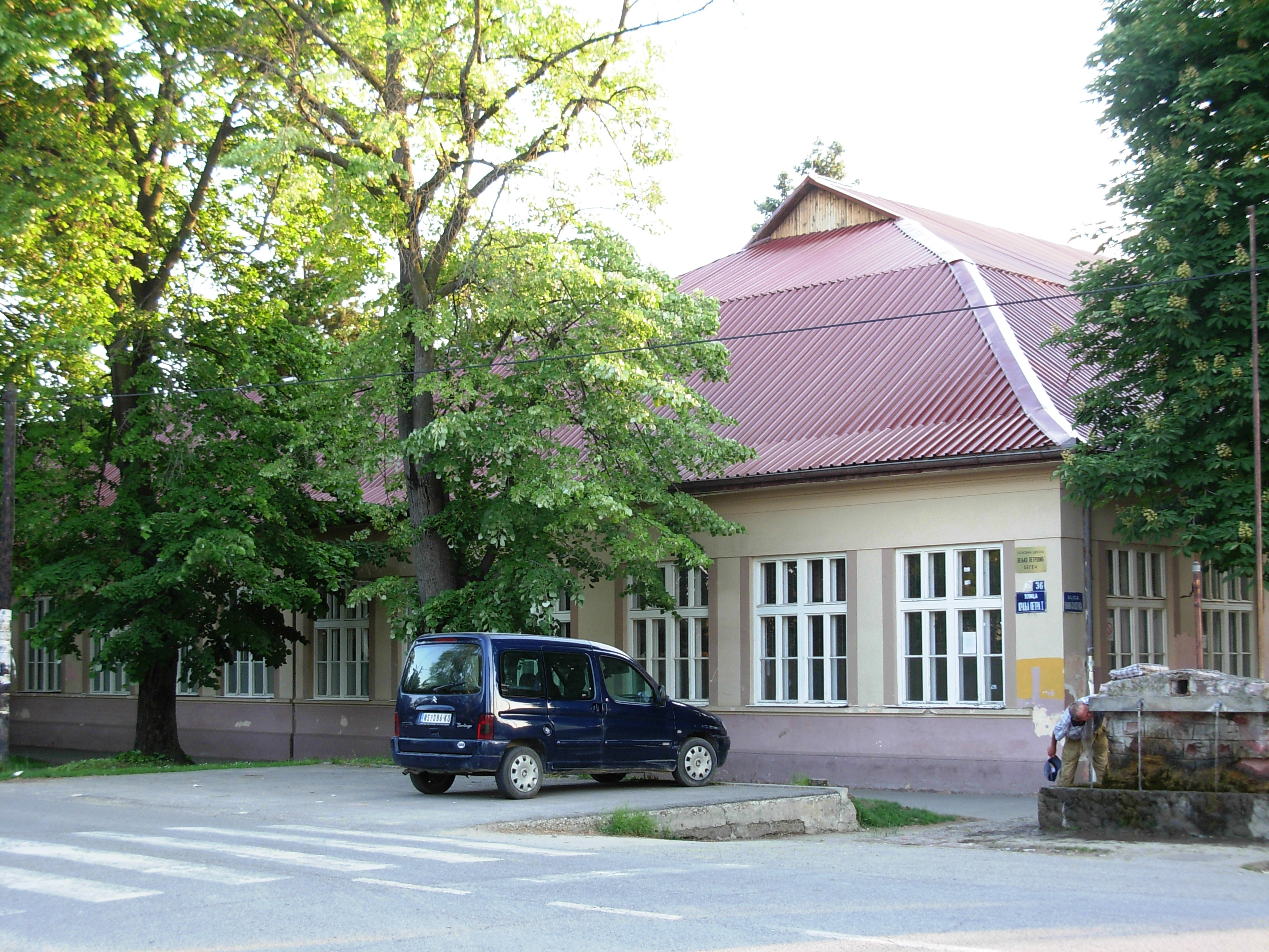 Osnovna škola Veljko Petrović u Begeču.